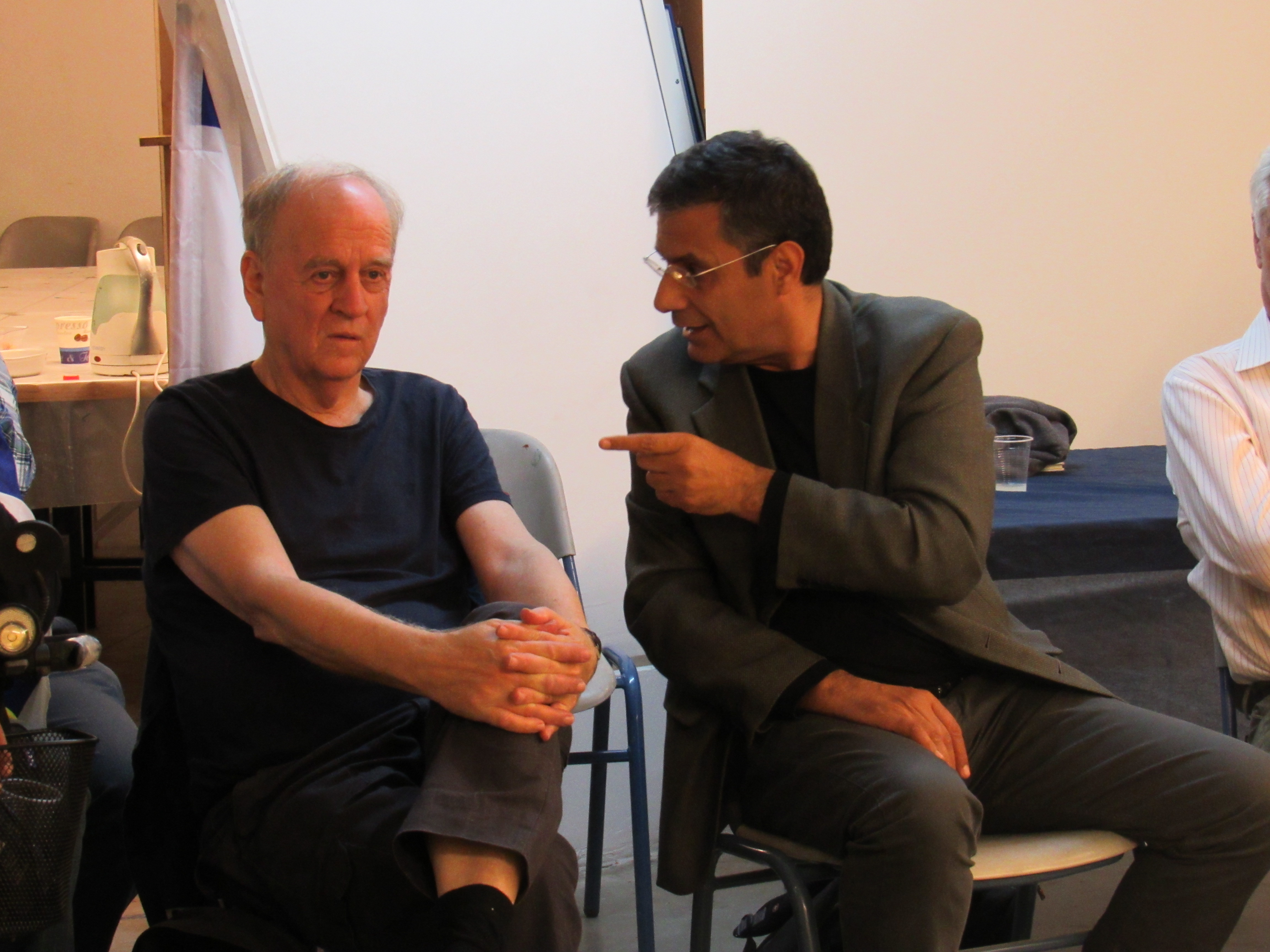 ח"כ פרופ' יוסי יונה ופרופ' אביה ספיבק